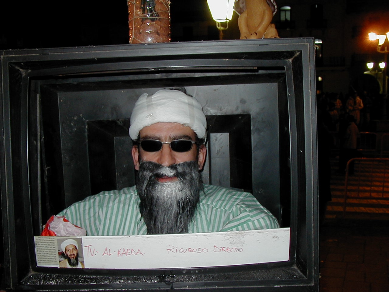 Autor: jesús Ruiz